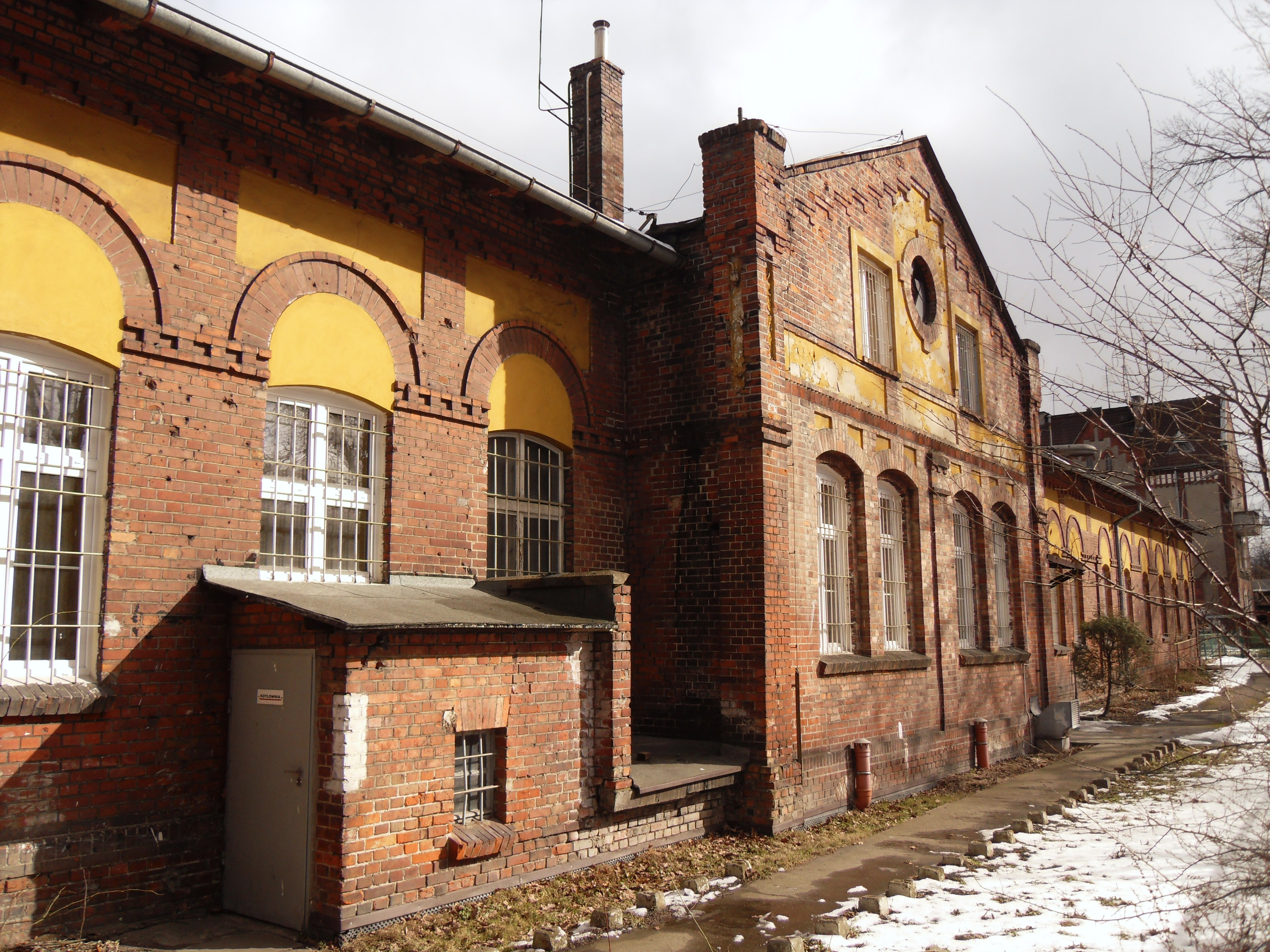 Dworzec Brama Oliwska - elewacja zachodnia.